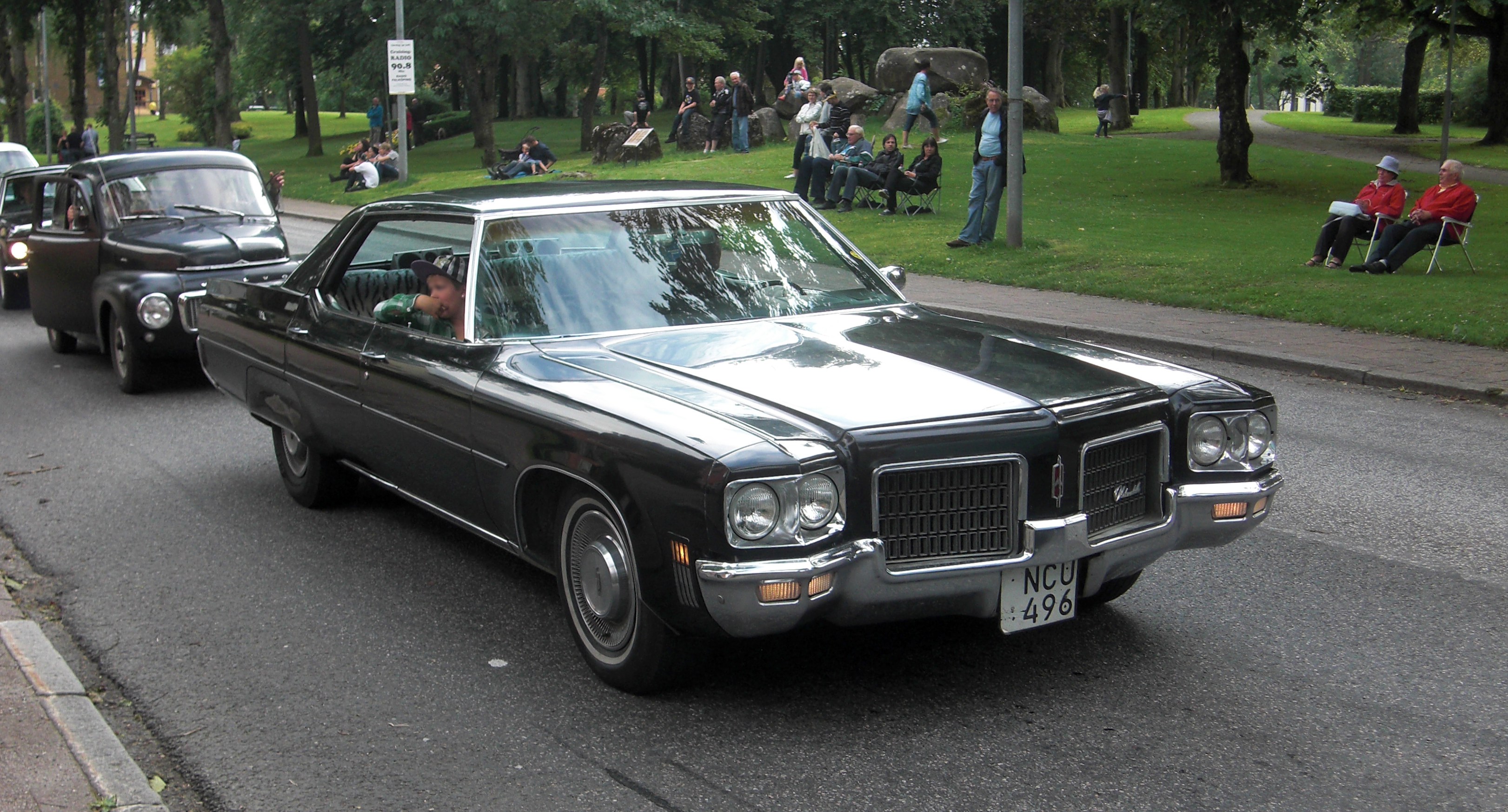 En Oldsmobile Ninety Eight 1971 på cruising på Ströget (Sankt Olofsgatan) i Falköping 2010-07-31